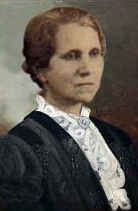 trajando indumentaria preta com gola branca